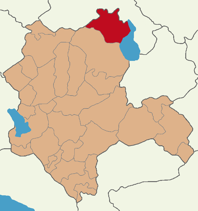 Kulu ilçesinin konumu